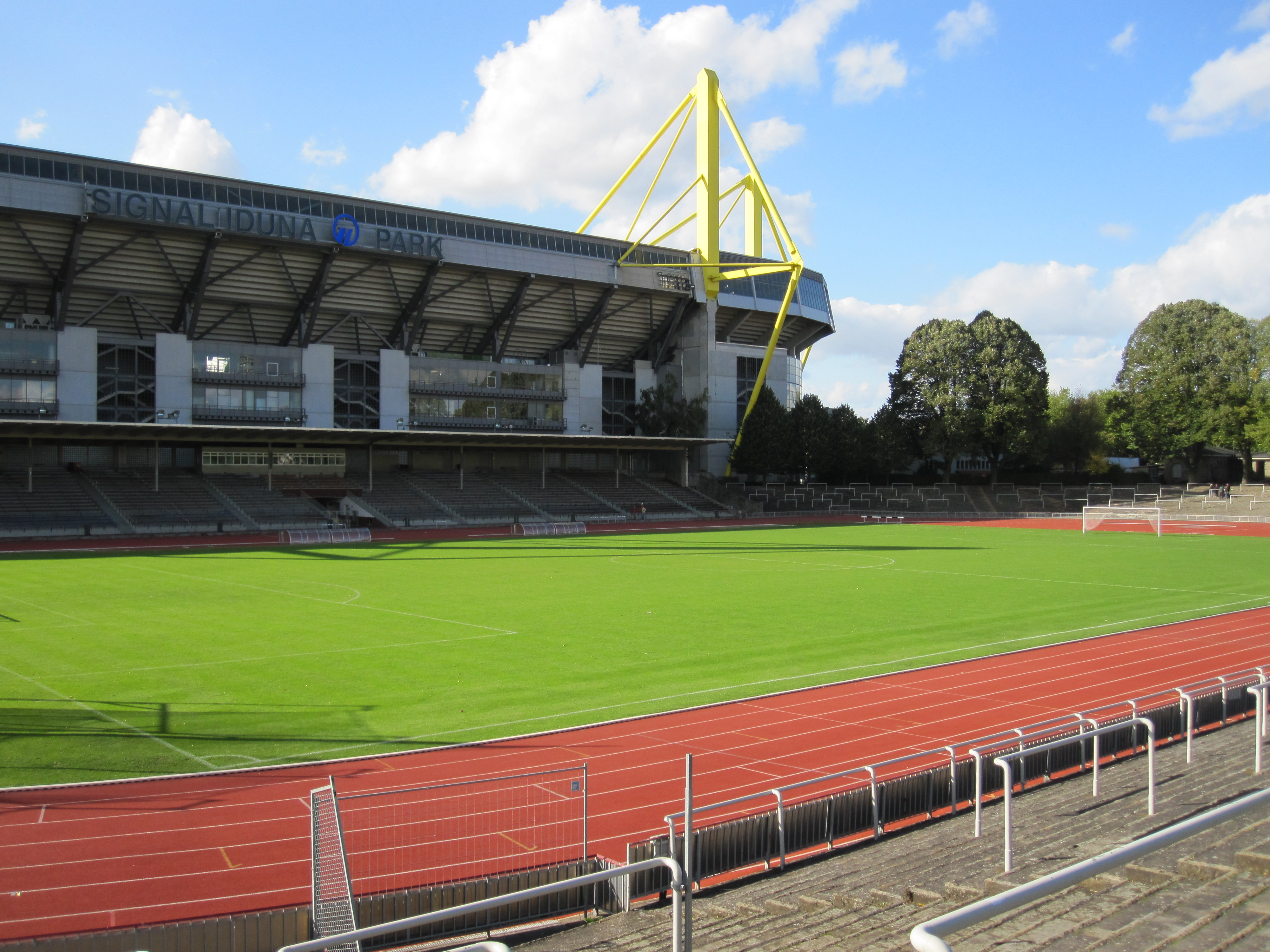 Stadion „Rote Erde“ in Dortmund